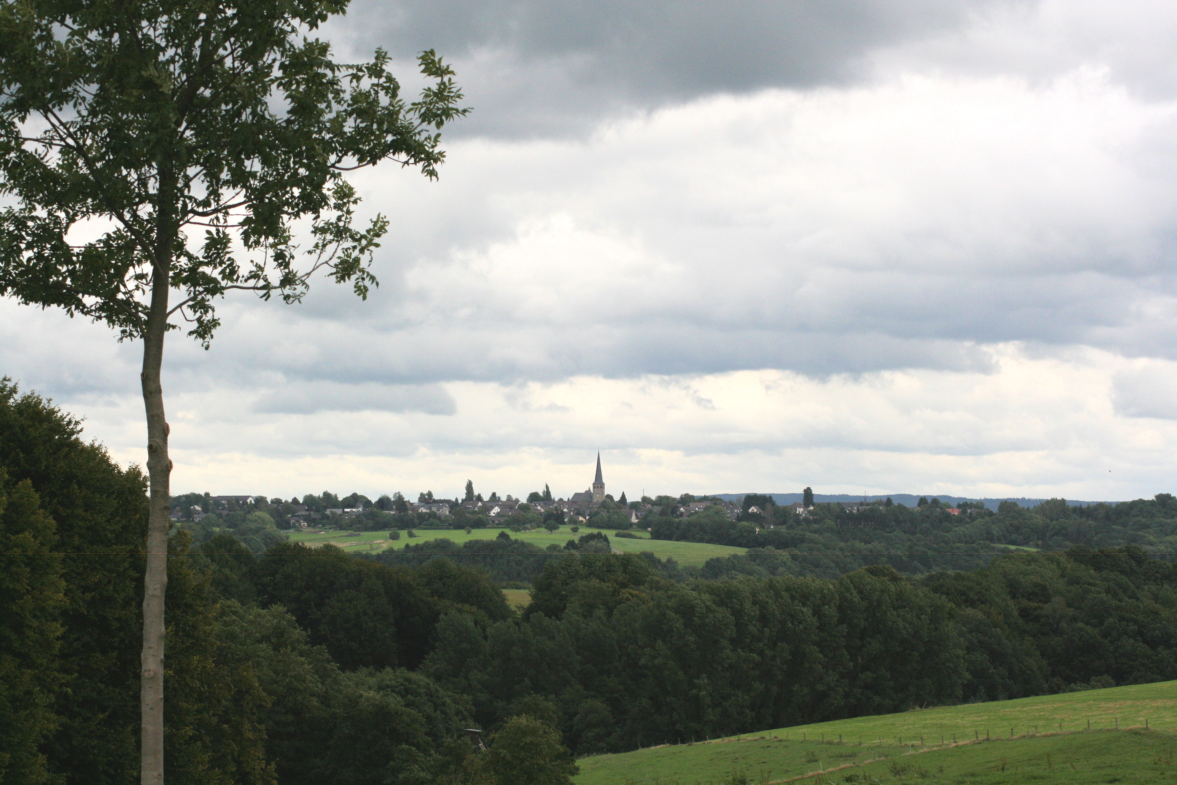 Panorama Neunkirchen aus Richtung Birk